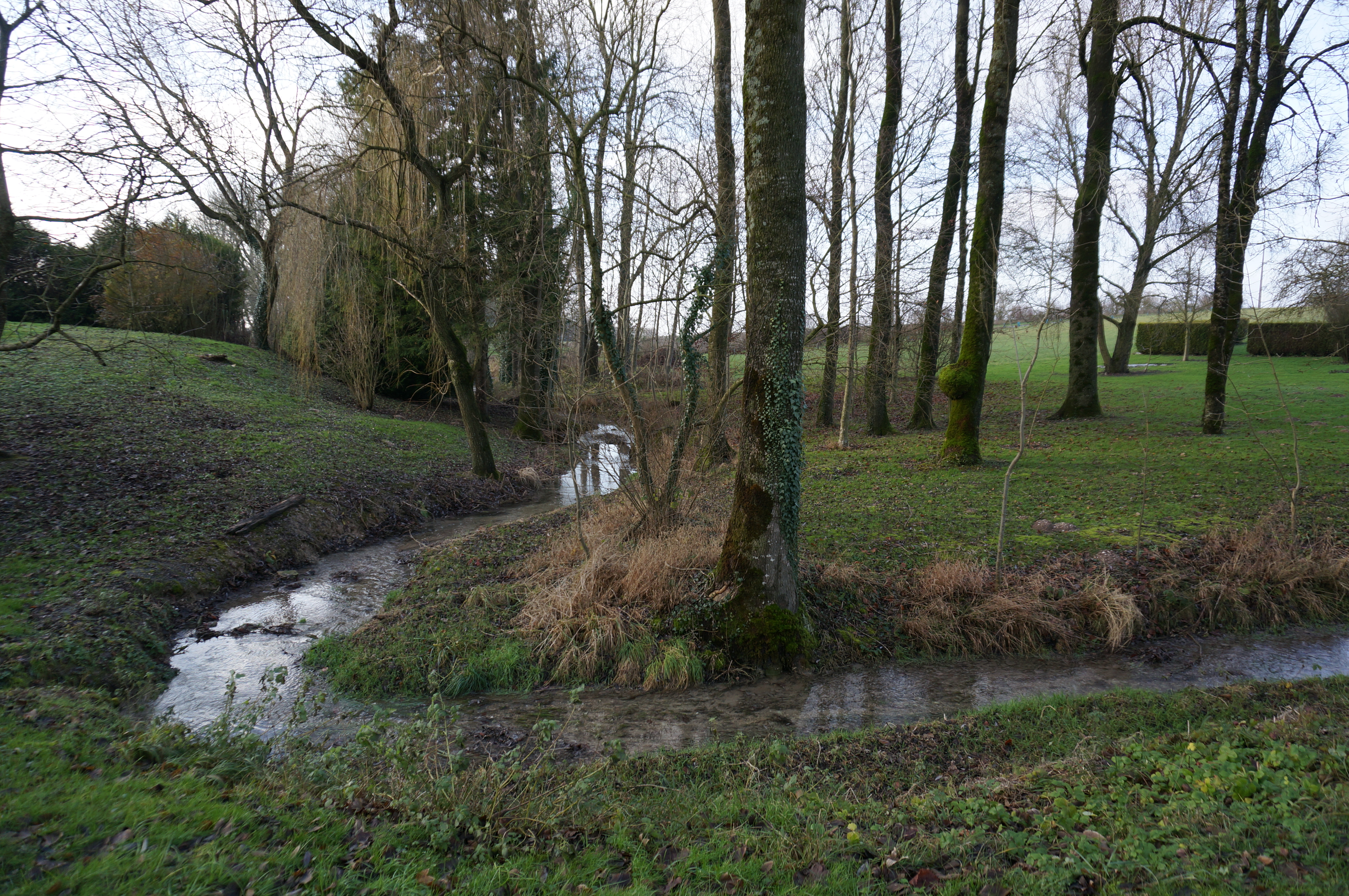 Ripoarisch: à Saint-Remy-sur-Bussy.